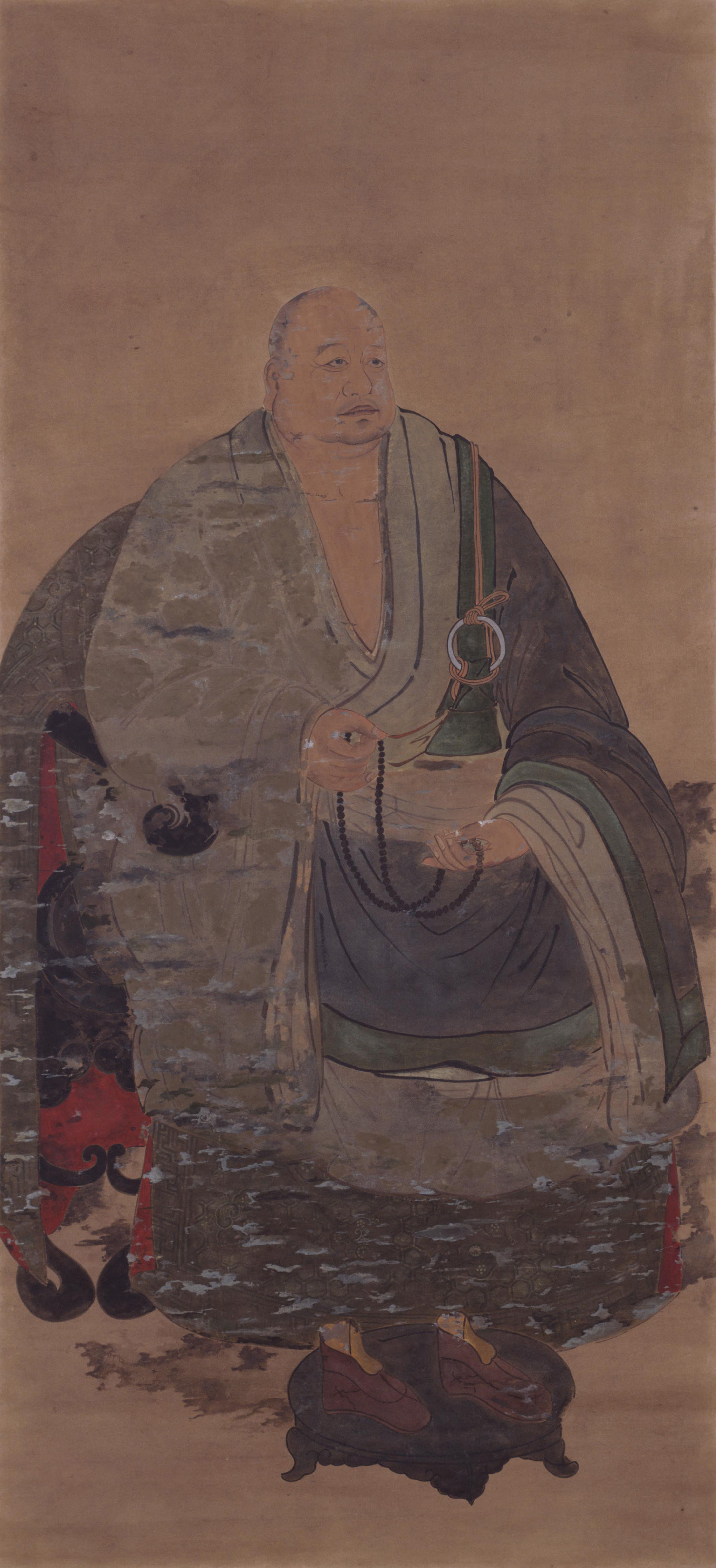 厚東武実の肖像。